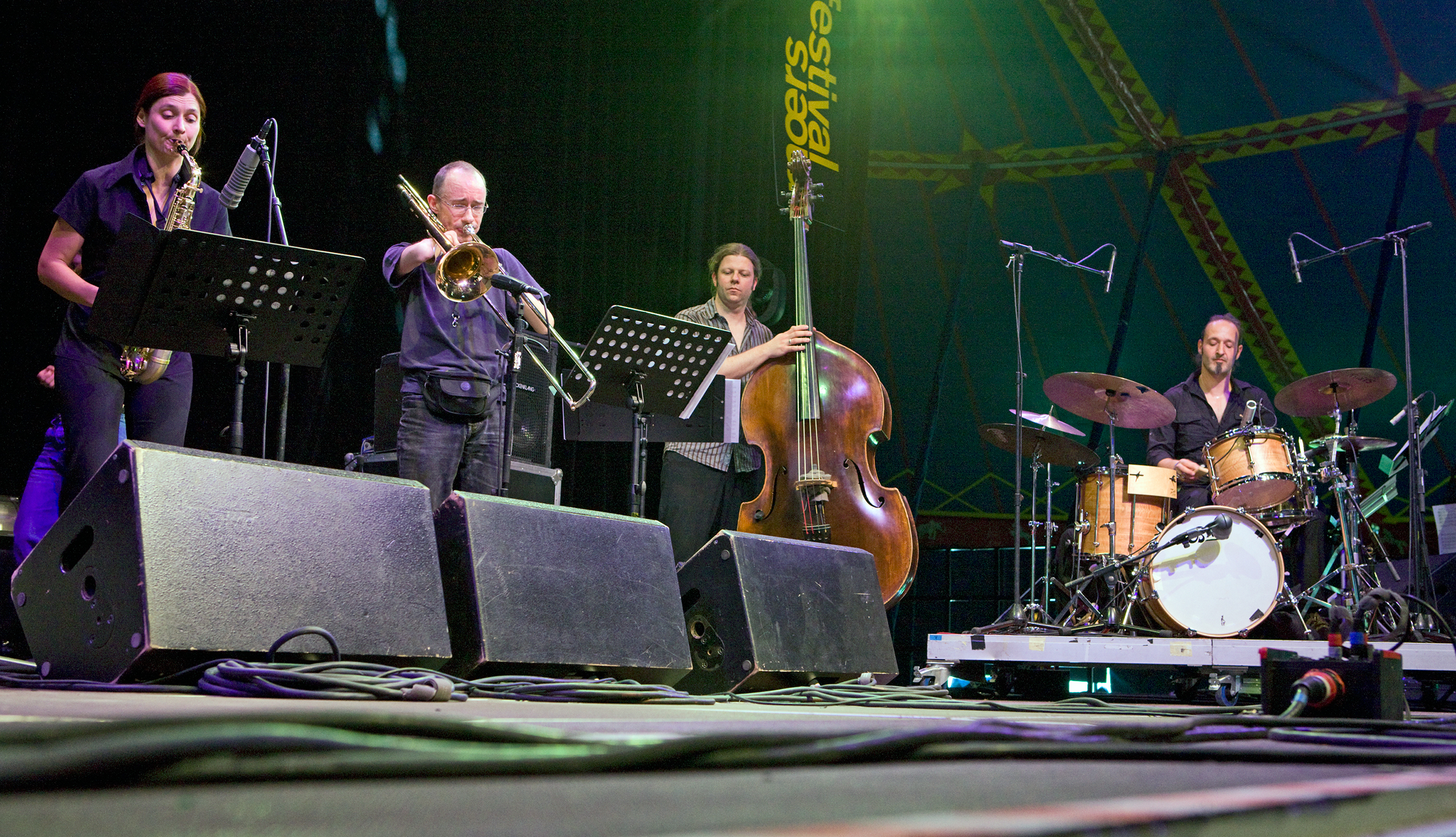 Angelika Niescier-Quartett, 12. Mai 2008, Moers Festival